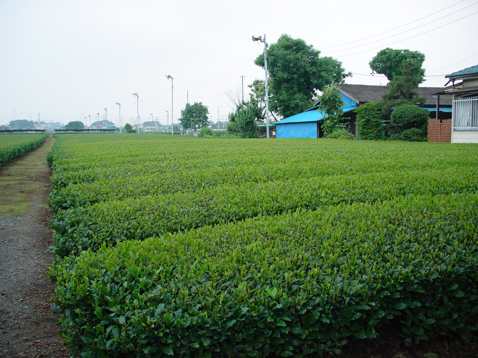 Champs de thé prêt à la récolte. Les ventilateurs servent à l'élimination de la rosée sur les feuilles. Saitama (Japon) Cliché personnel. Ruizo